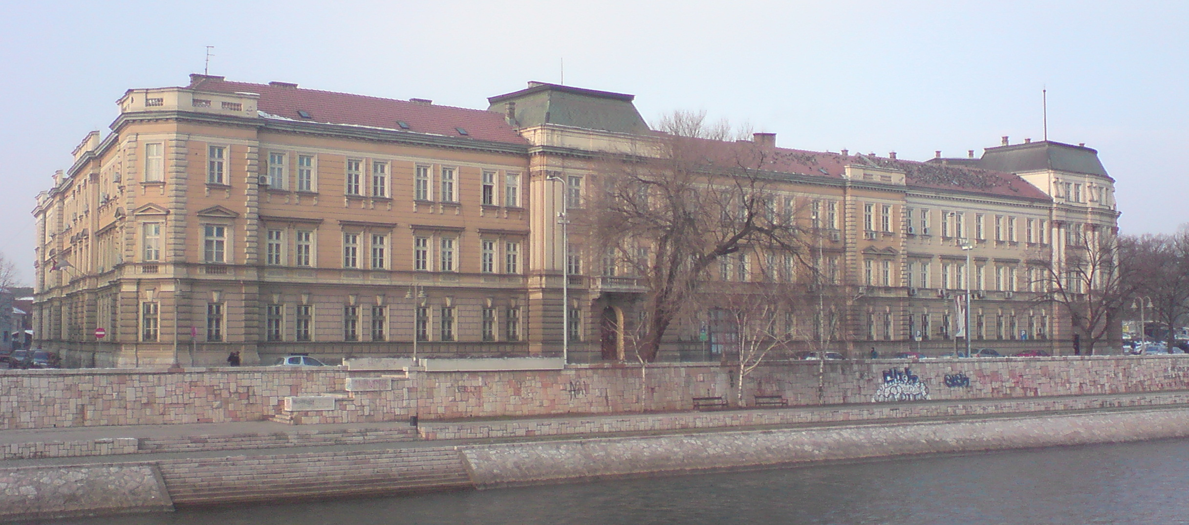 Зграда Бановине у Нишу. Снимљено мобилним телефоном.